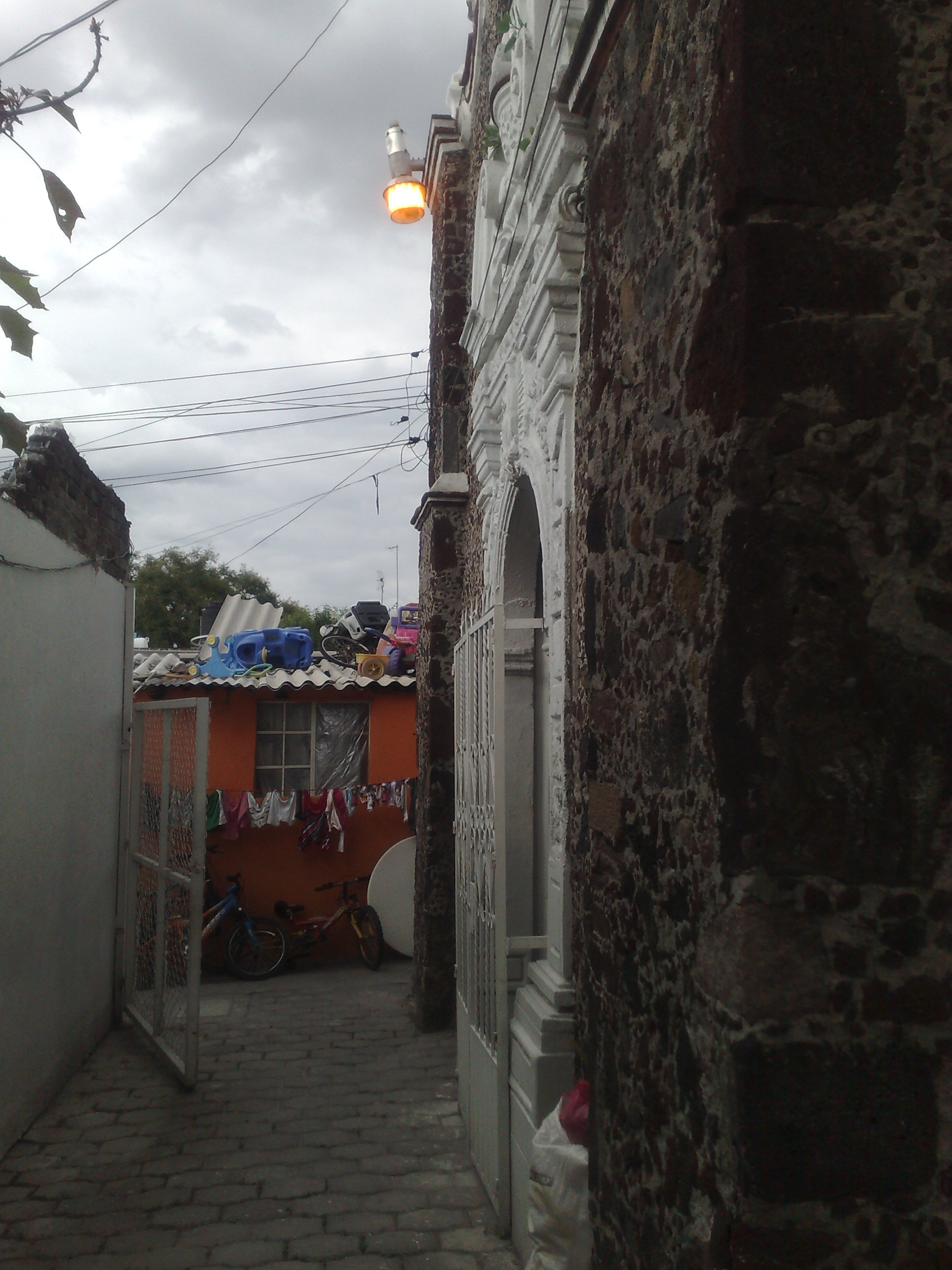 Ermita de la Asunción, la fachada frente a un callejón de apenas dos metros